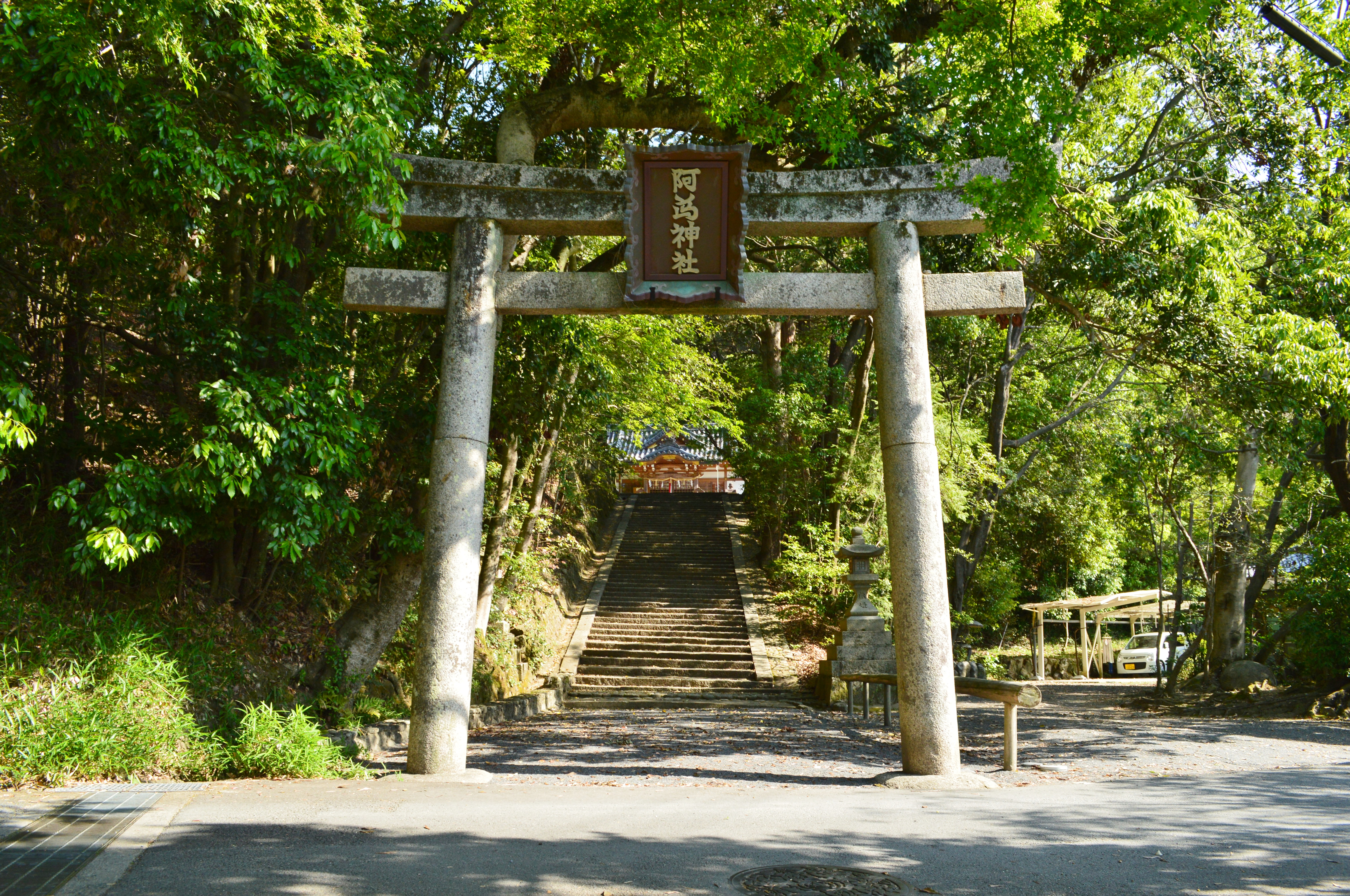 阿為神社 鳥居 Nikon D3200